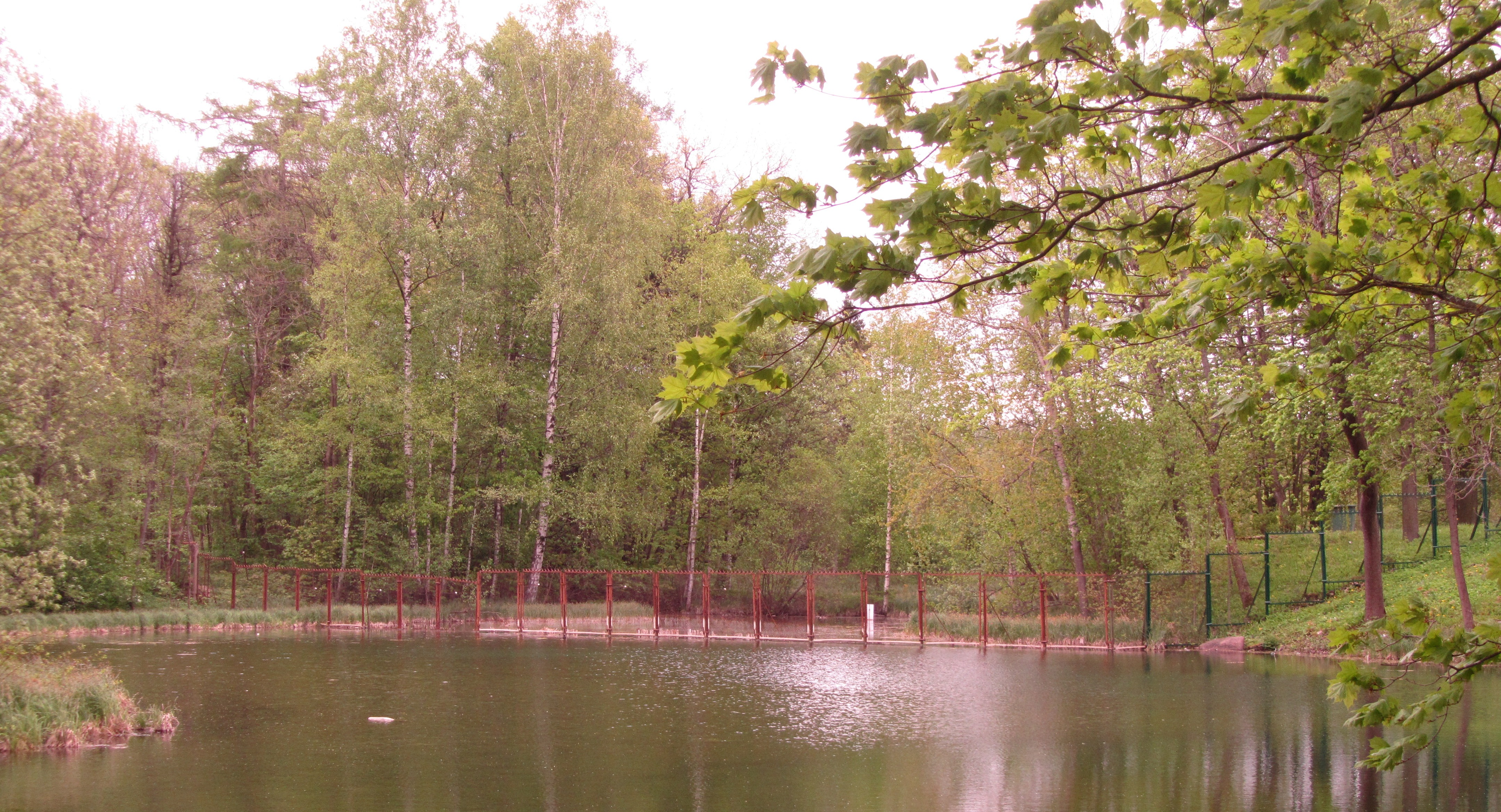 Место расположения Плоского моста, май 2015 г.